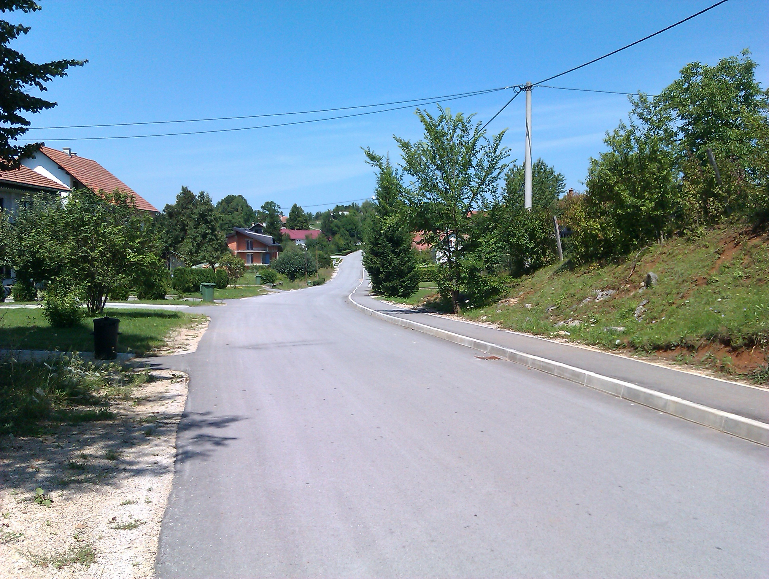 Gornje Taborište